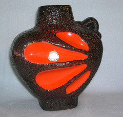 Vase à glaçure en relief, allemagne, XXe siècle. Manufacture Es-Keramik